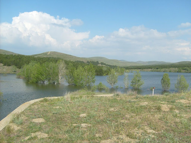 Eskişehir ili Sivrihisar ilçesi Kaymaz beldesinde bulunan Kaymaz barajı fotoğrafı